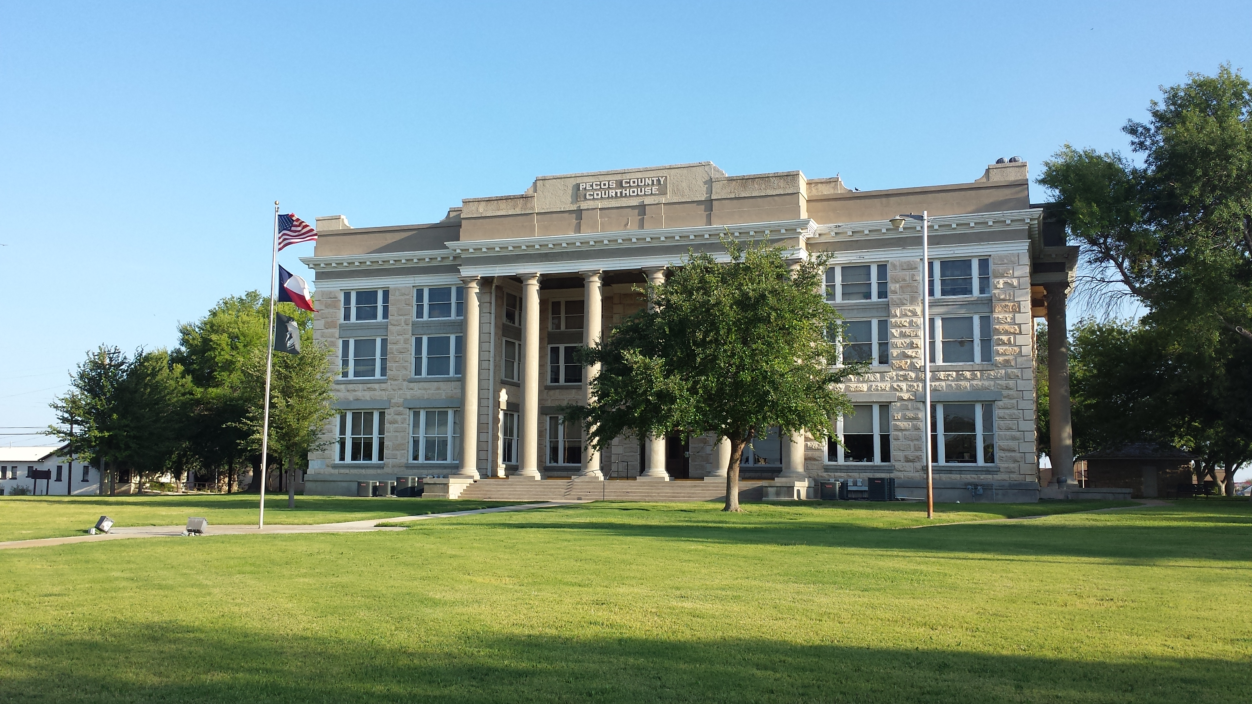 Fort Stockton, TX 79735, USA